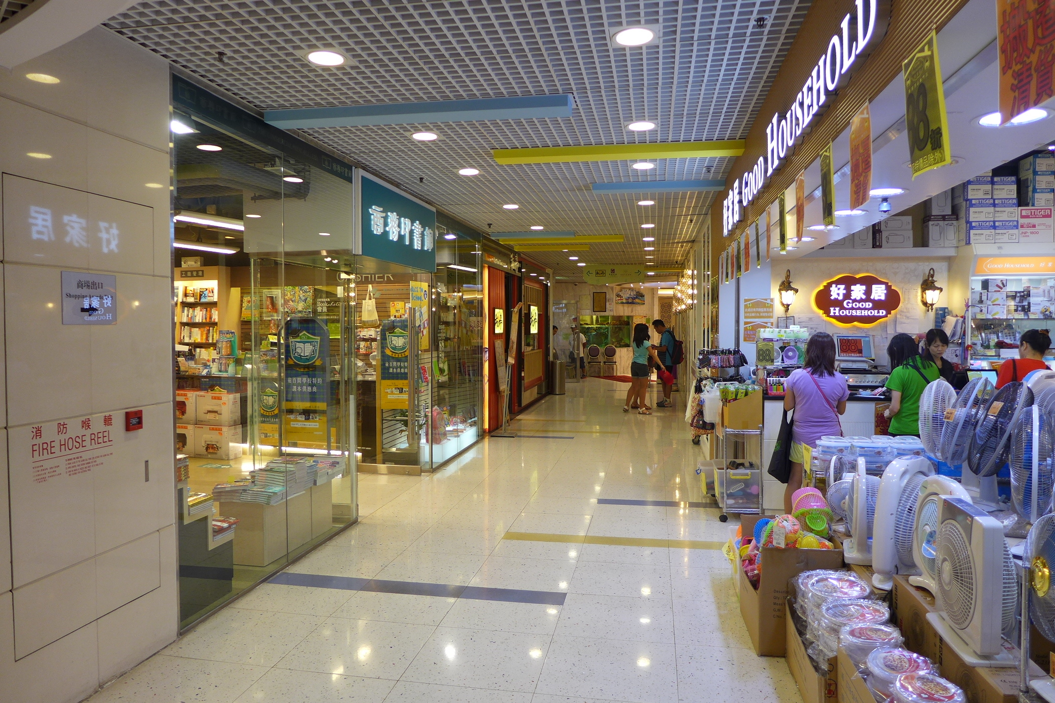 Aberdeen Centre Ac5 interior